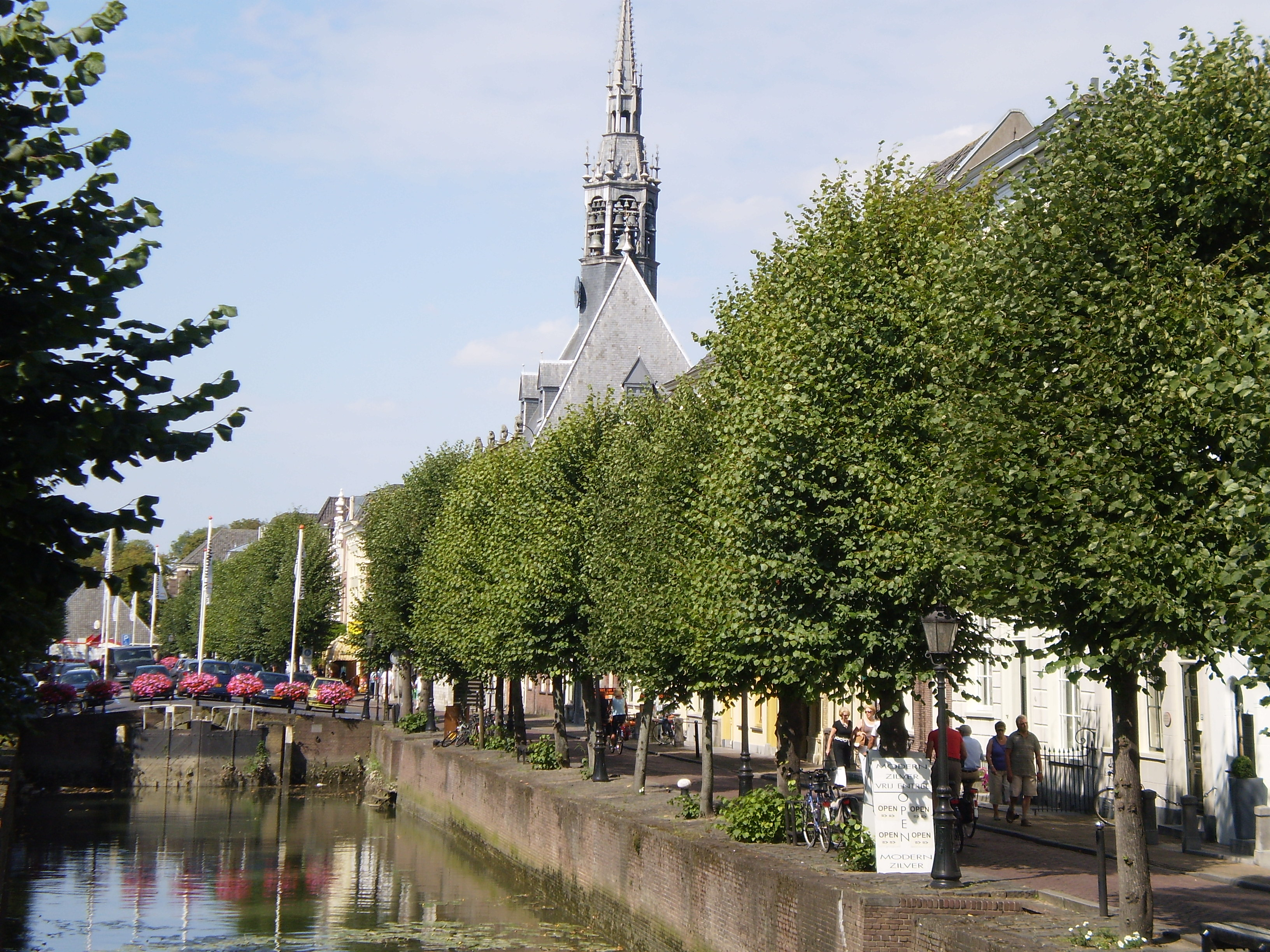 Ofbyld oanbean troch Swarte Kees op 5 augustus 2009